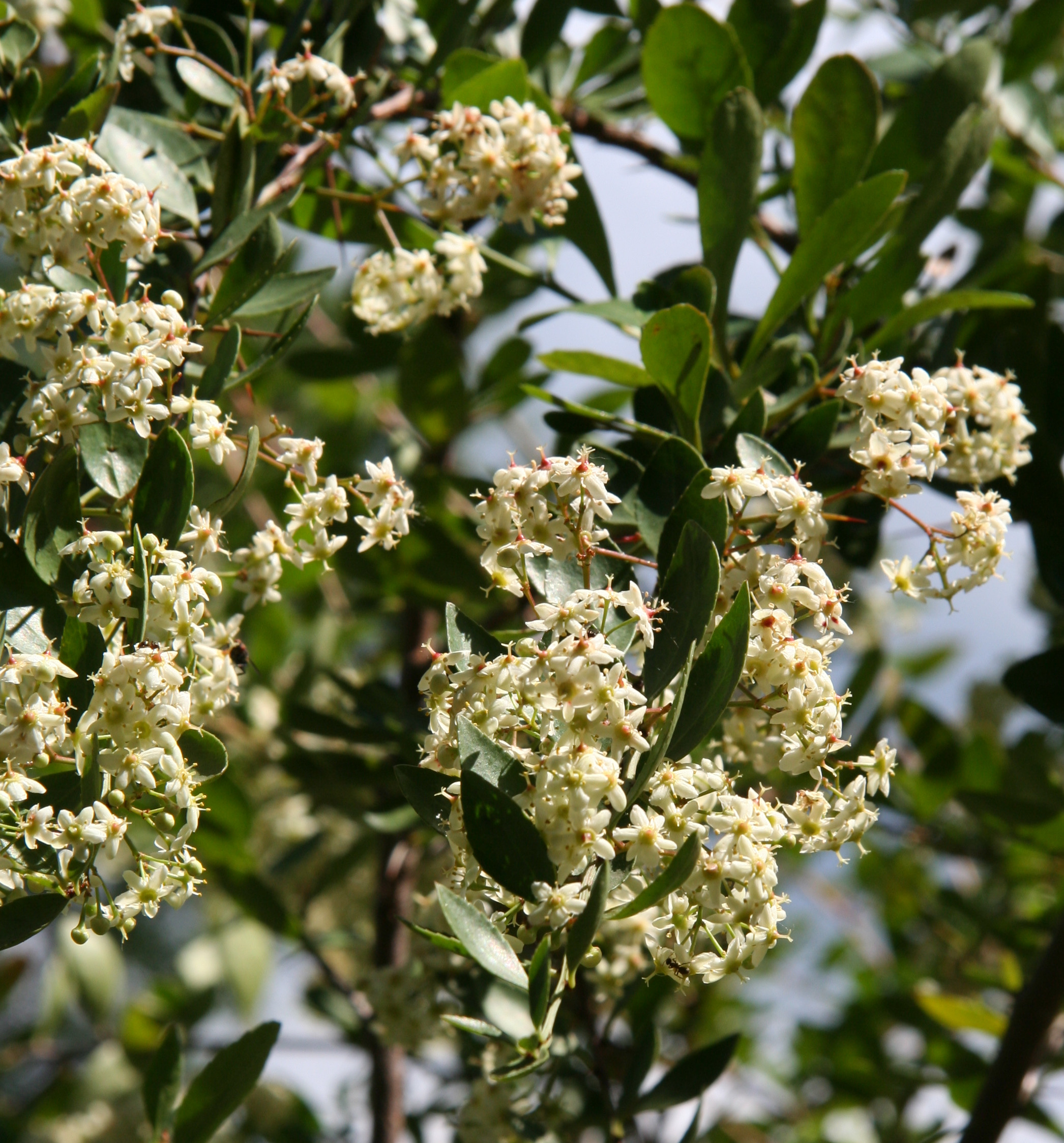 Putterlickia pyracantha im Botanischen Garten Dresden